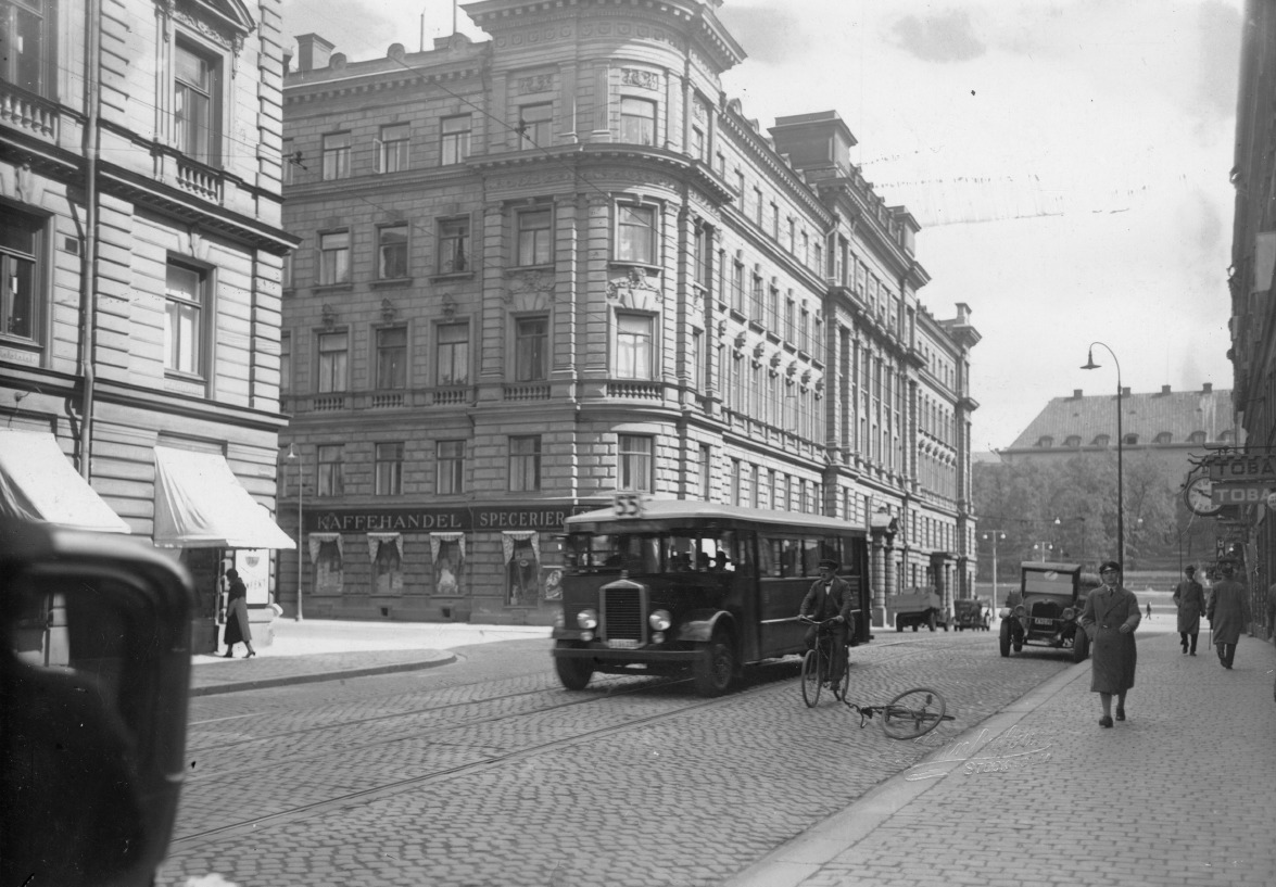 SpårvägspalatsetBildnr: 2166-6